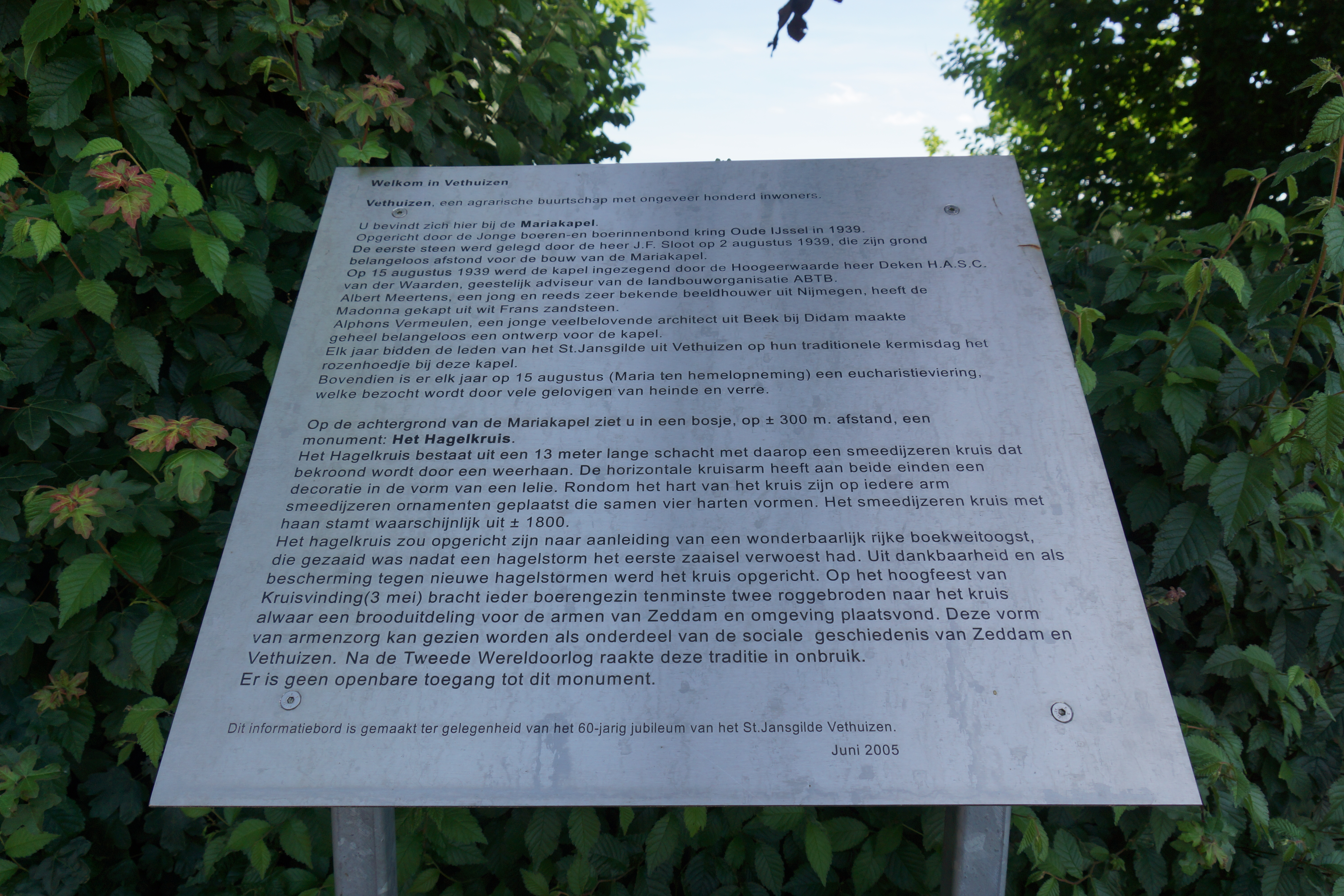 Vethuizen 150615 (3)